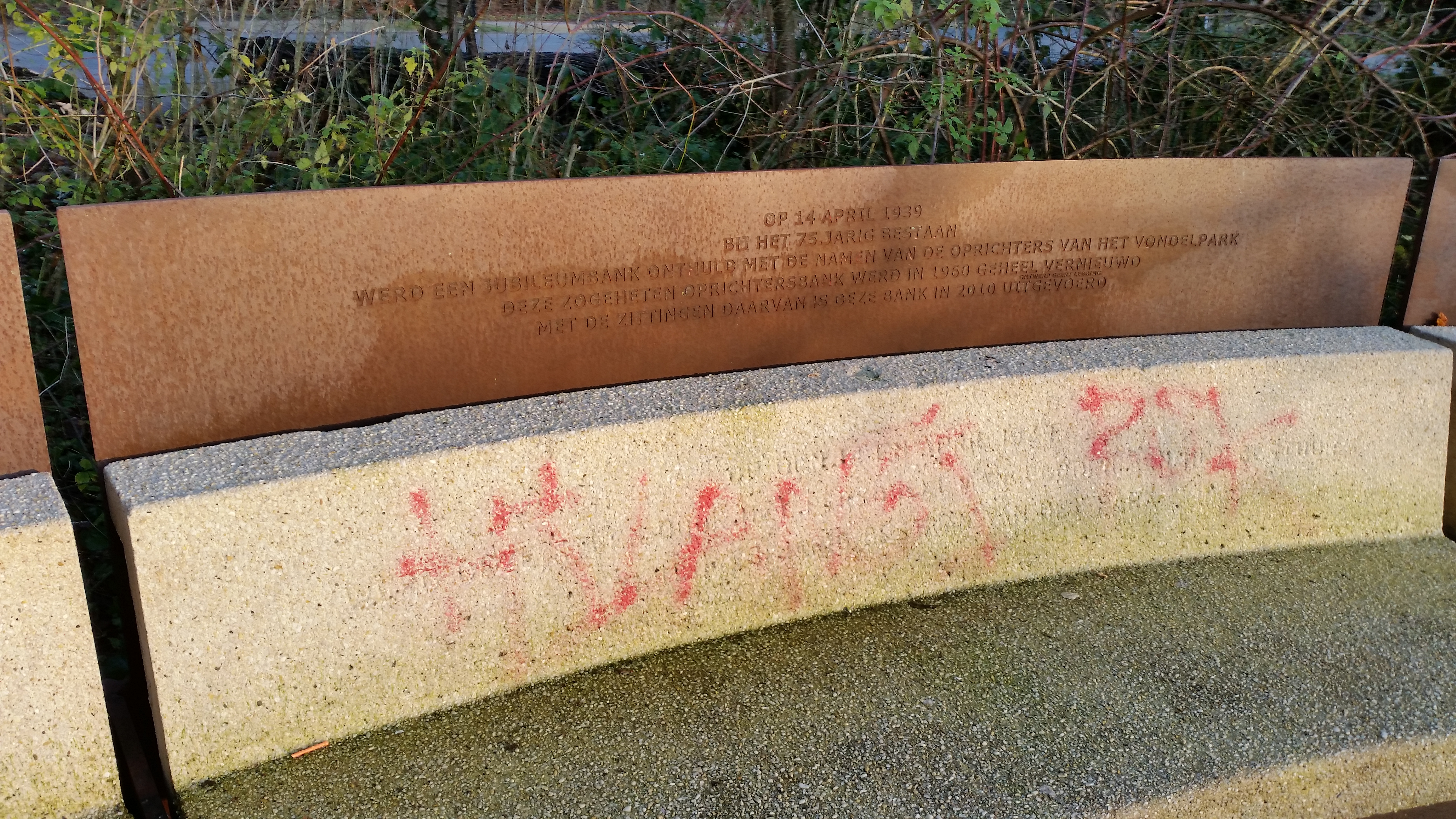 Detail van Jubileumbank Vondelpark